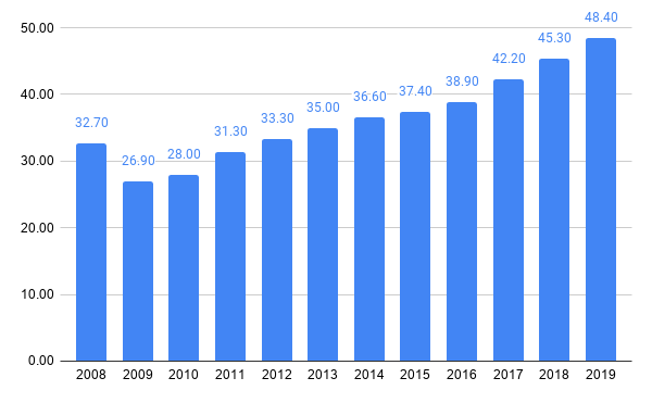 mldr EUR